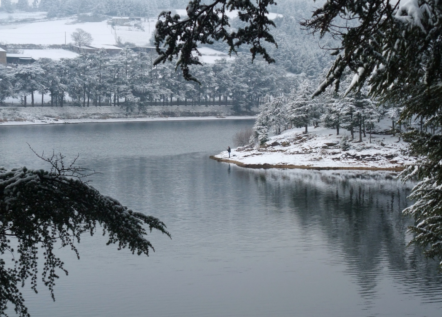 Saint-Marcel-lès-Annonay pêcheur Ternay neige